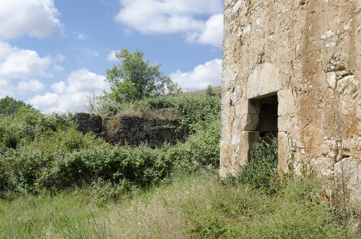 Ruinas. Hormicedo. España.